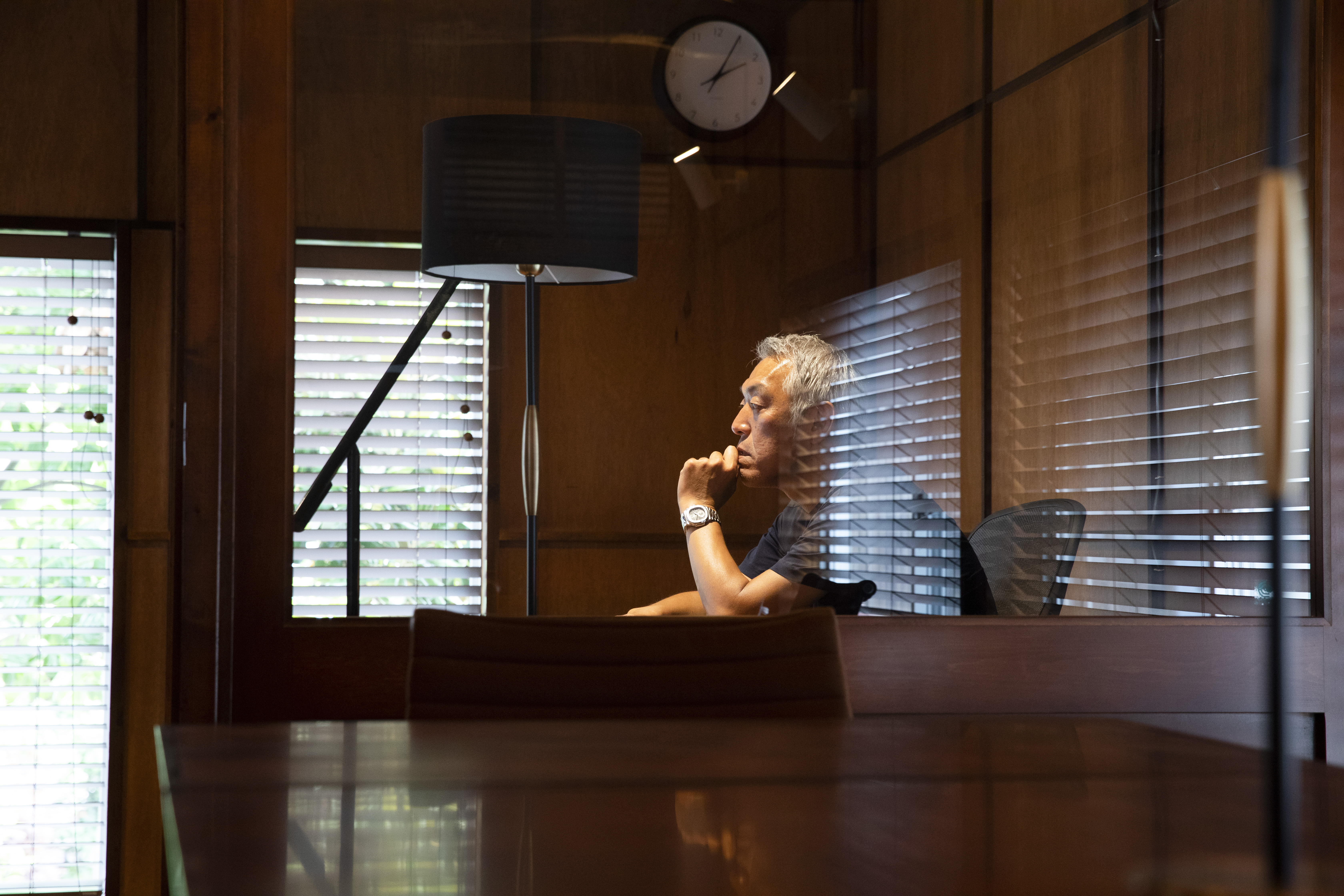 映画美術監督 原田満生のポートレート写真、6月5日、鎌倉で撮影。